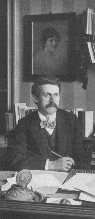 Georg Reicke (1863-1923), ab 1902 Zweiter Bürgermeister von Berlin.